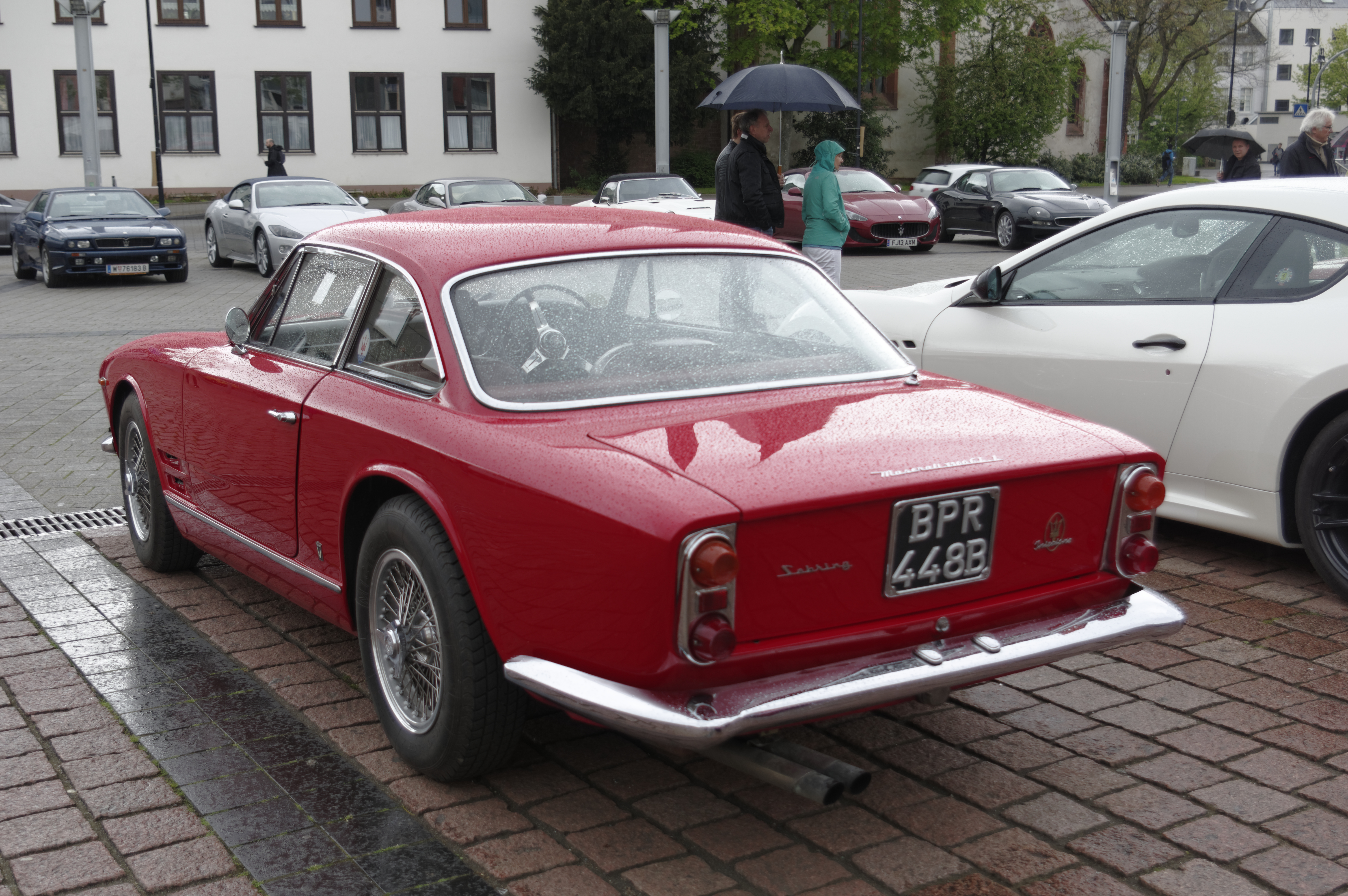 Ausstellung eines britischen Maserati Clubs in Trier